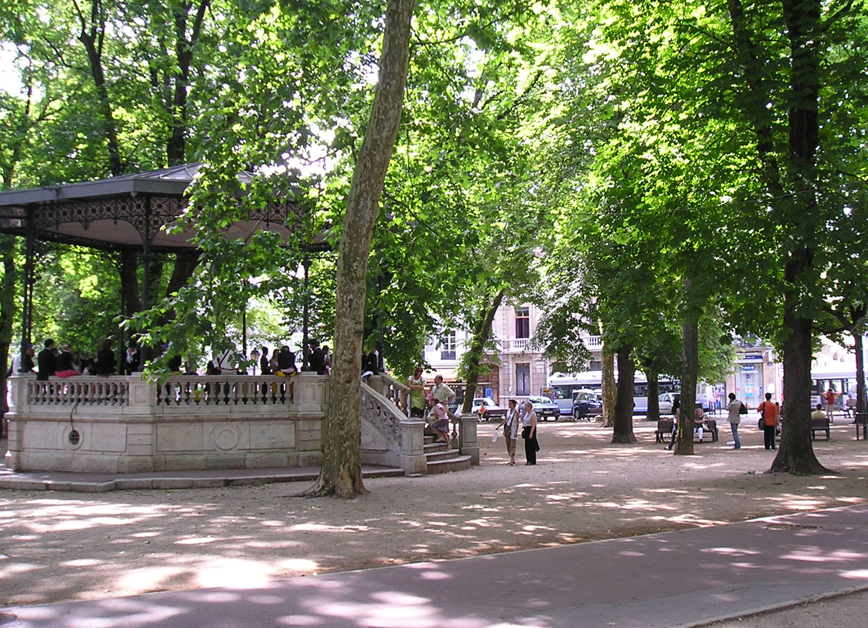 Promenade Granvelle de Besançon